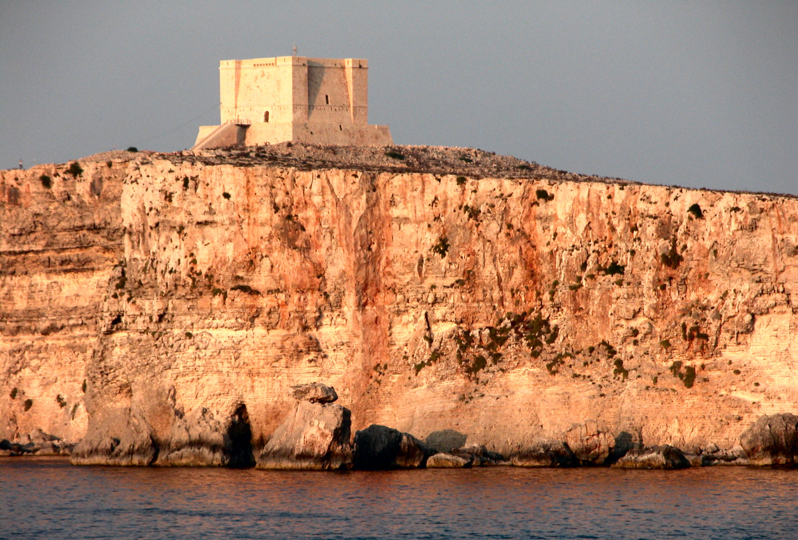 Comino, Malta, St. Mary. Foto scattata da Stefano Trezzi e rilasciata sotto Creative Commons. Aggiornamento licenza in data 26/05/2007, da cc-by-nc-sa-2.0-it alla seguente licenza. --yoruno sparisci sott'acqua 12:01, 26 mag 2007 (CEST)